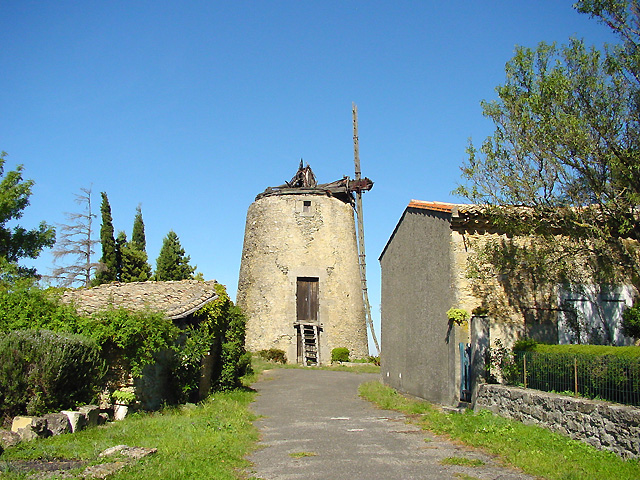 Le moulin de Baraigne (Aude, France).